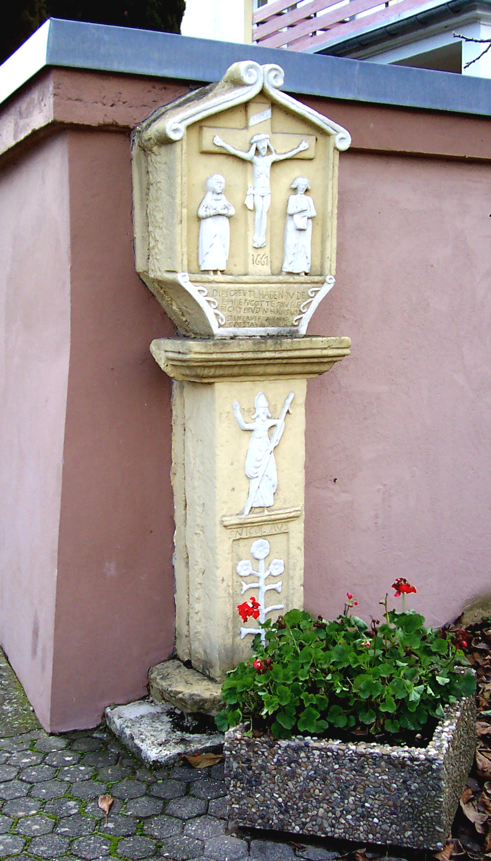 Wasserliesch, Schifferkreuz in Reinig